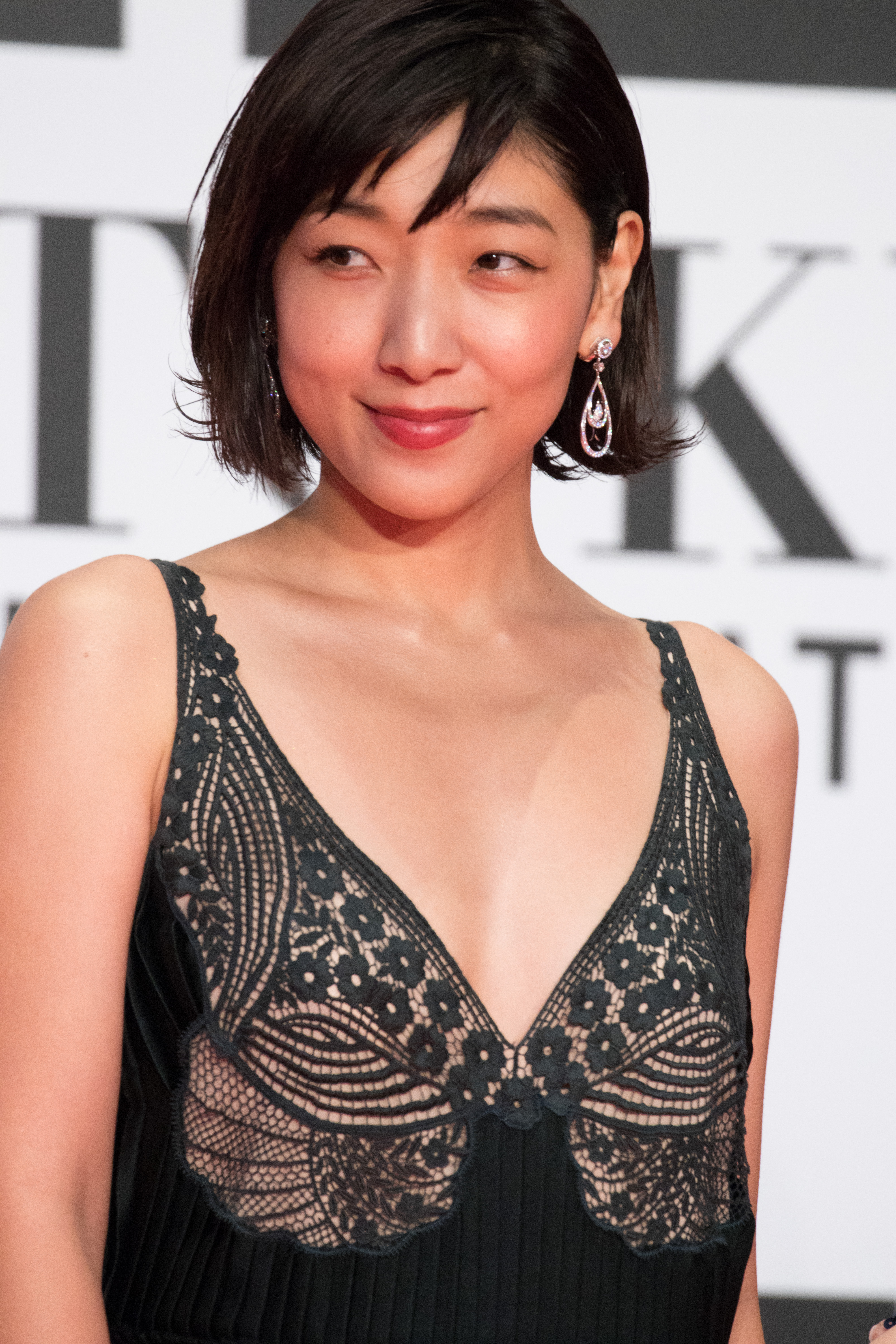 第29回 東京国際映画祭 オープニングセレモニー 安藤サクラ (島々清しゃ)